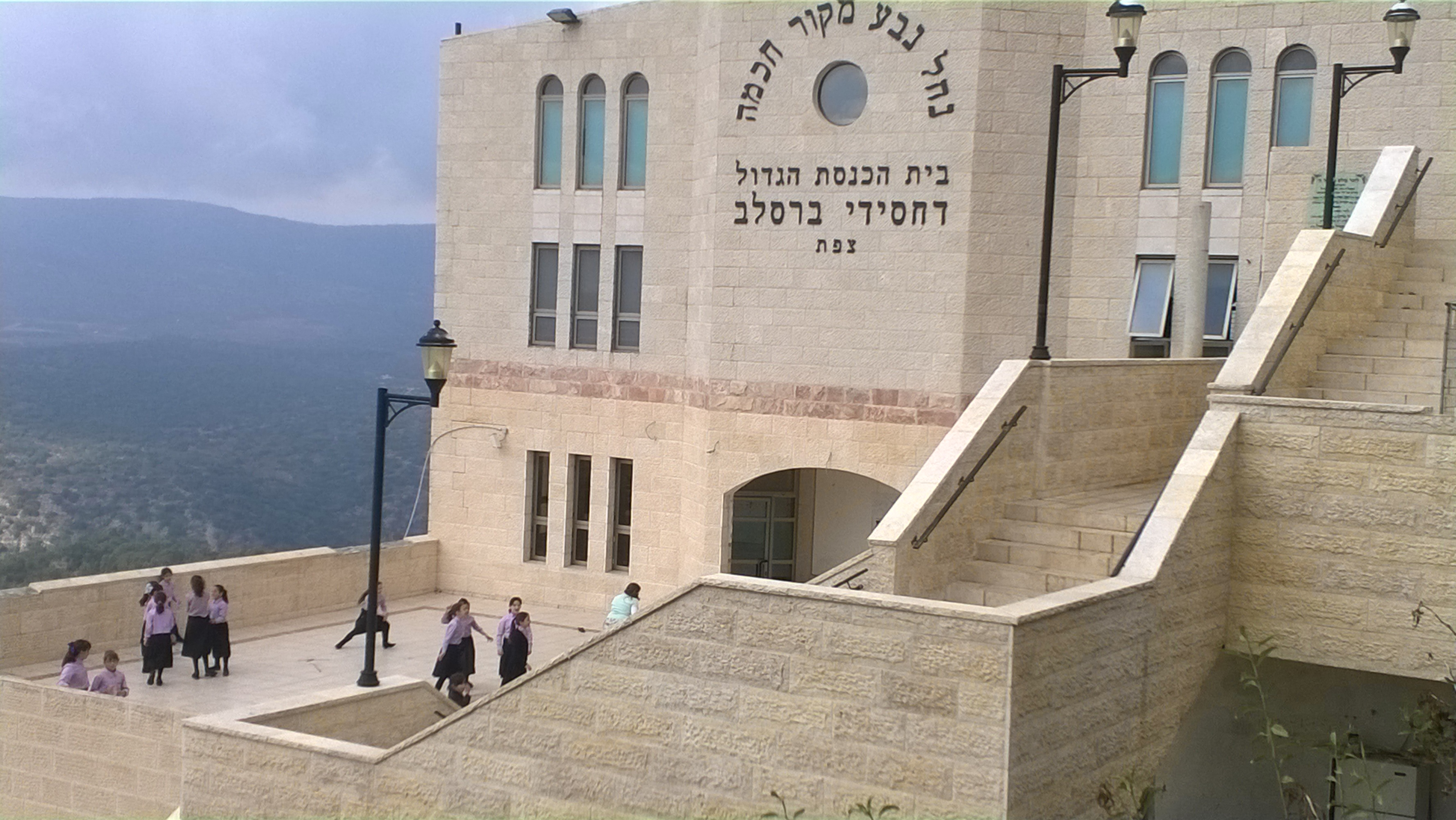 מוזיאון בית המאירי הוא מוזיאון היסטורי המתעד את קורות היישוב היהודי בצפת מן המאה ה-19 ועד שנת 1948.